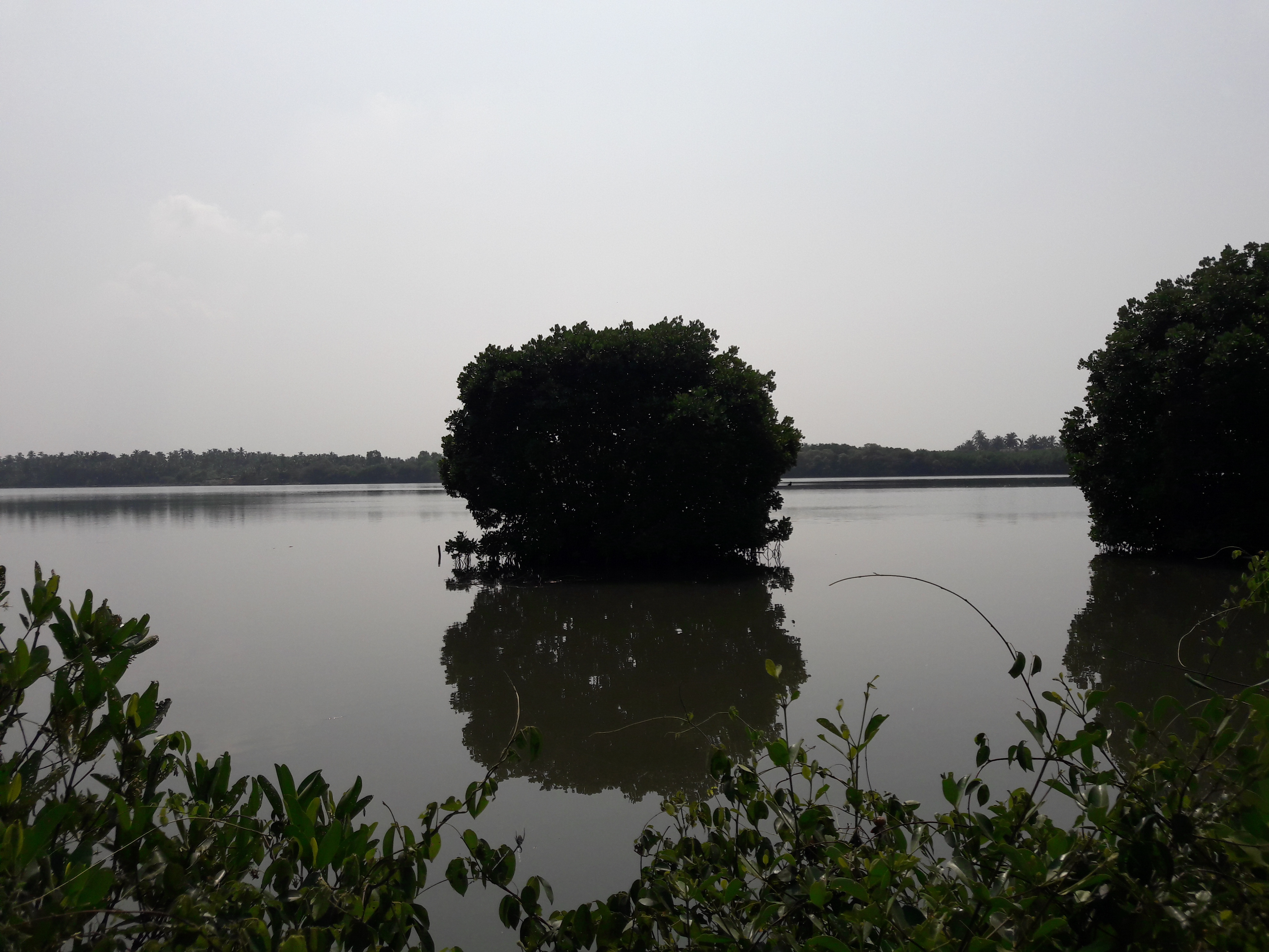 പ്രാന്തന്‍ കണ്ടല്‍ Loop-root mangrove ശാസ്ത്രീയ നാമം Rhizophora mucronata കുടുംബം Rhizophoraceae.